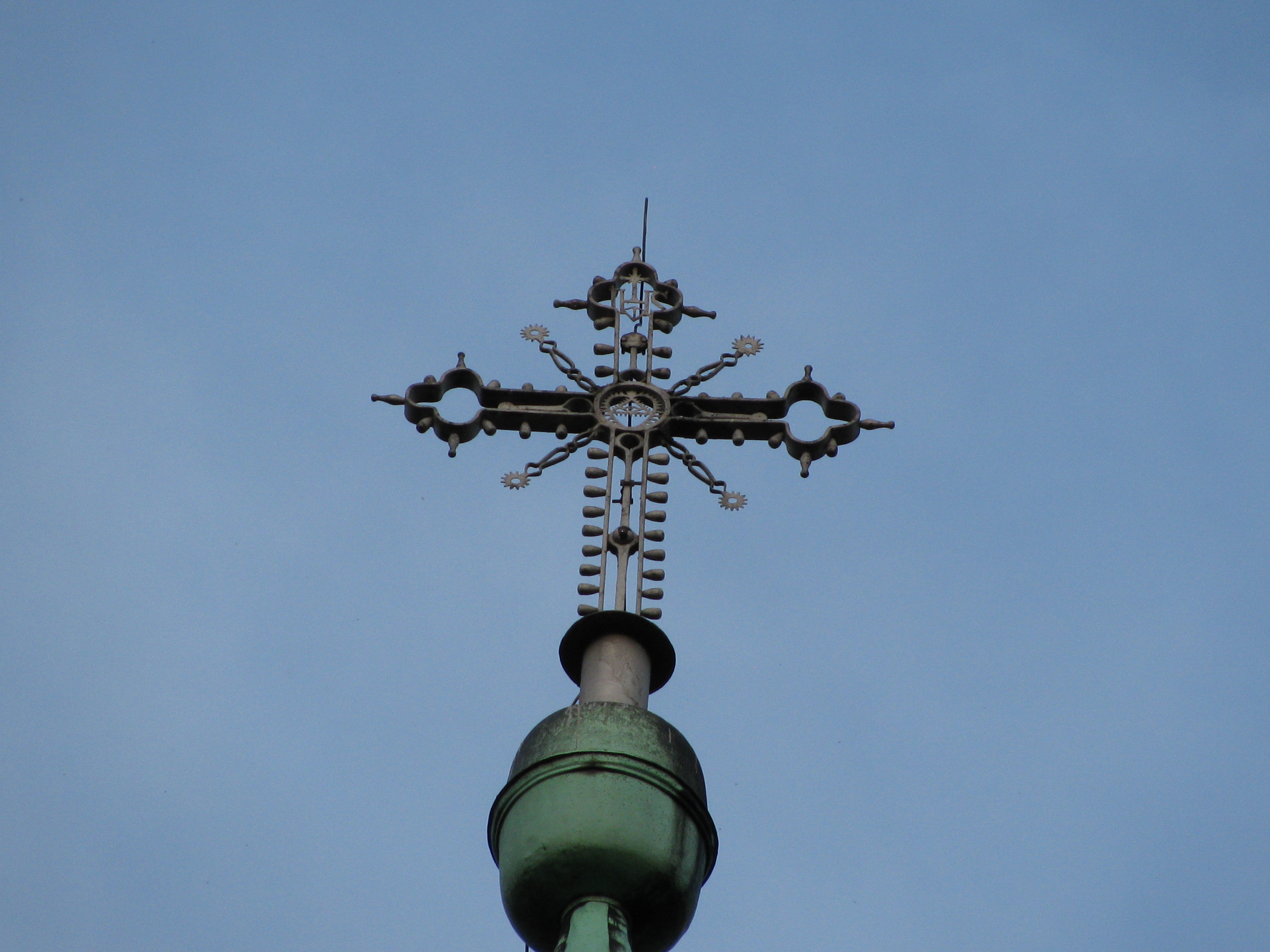 Kuty żelazny krzyż na wieży kościoła w Skalmierzycach -rękodzieło Jana Wawrzyńczaka